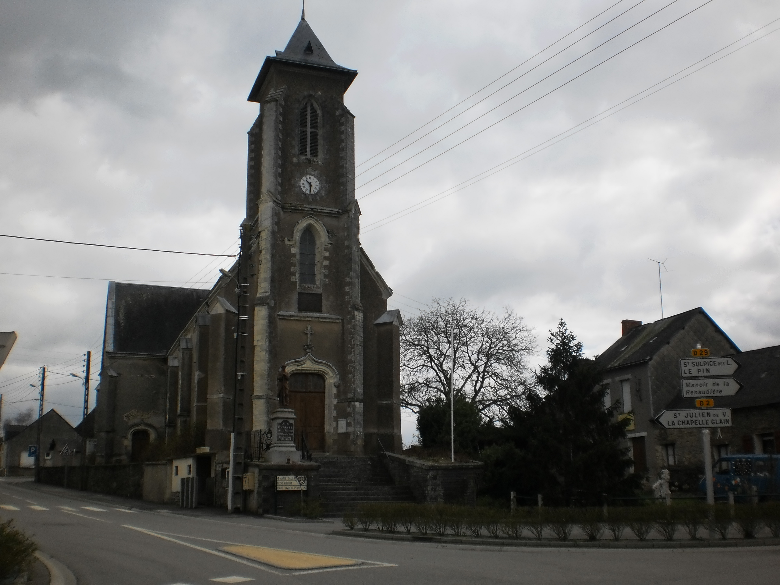 Petit-Auverné (Loire-Atlantique, France) - église